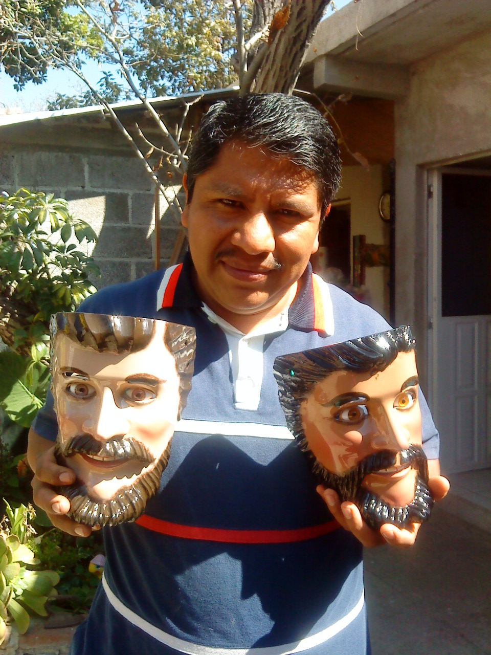 artesano tlaxcalteca elabora mascaras de carnaval